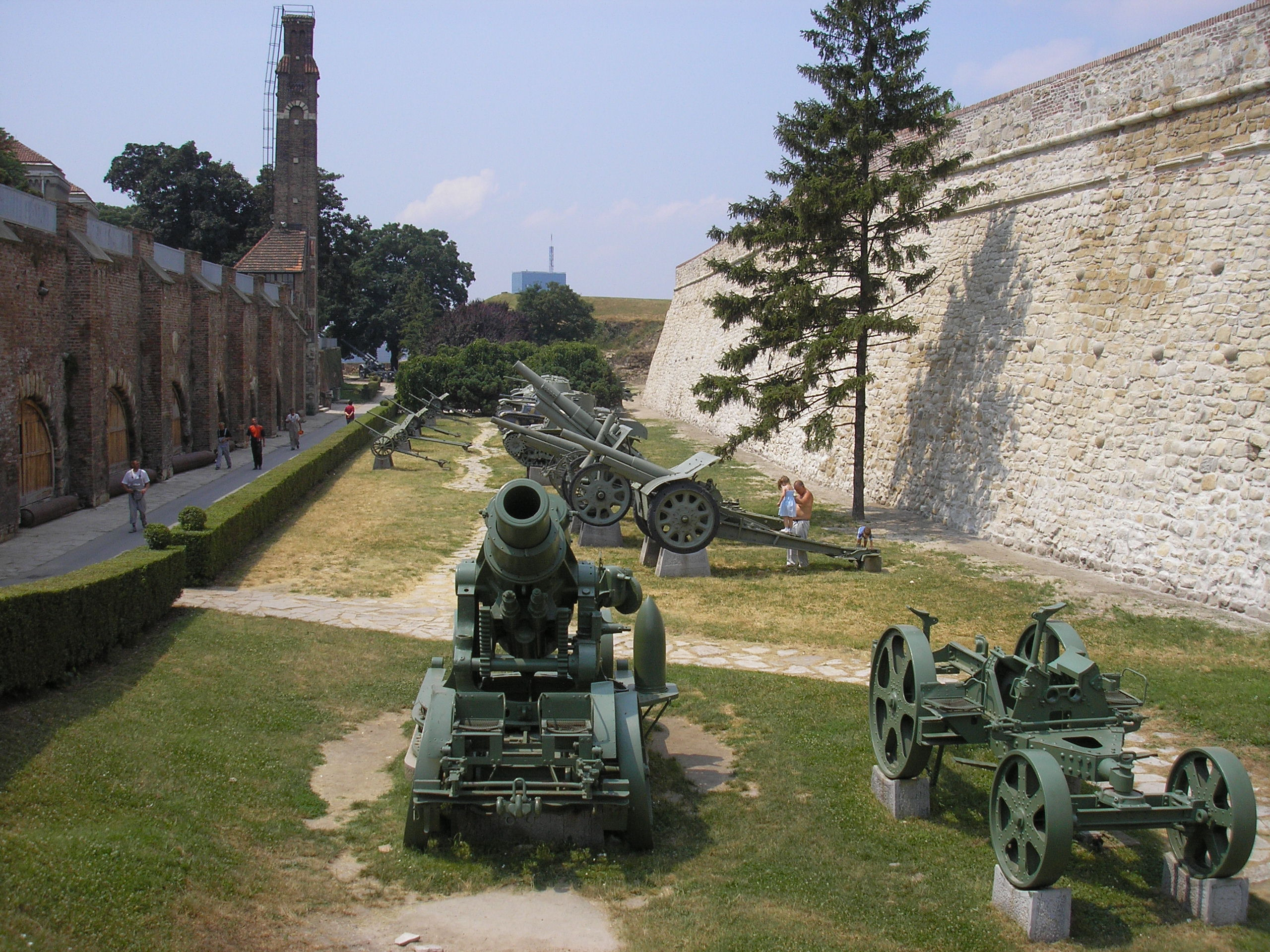 Izložba naoružanja na Kalemegdanu.